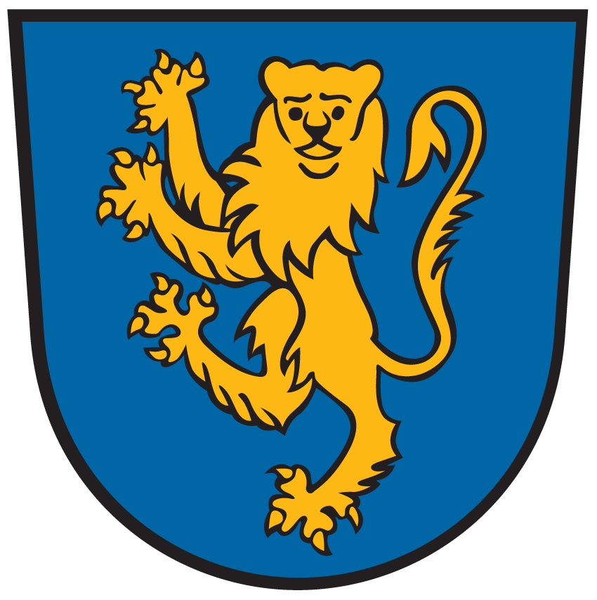 Wappen von Nötsch im Gailtal